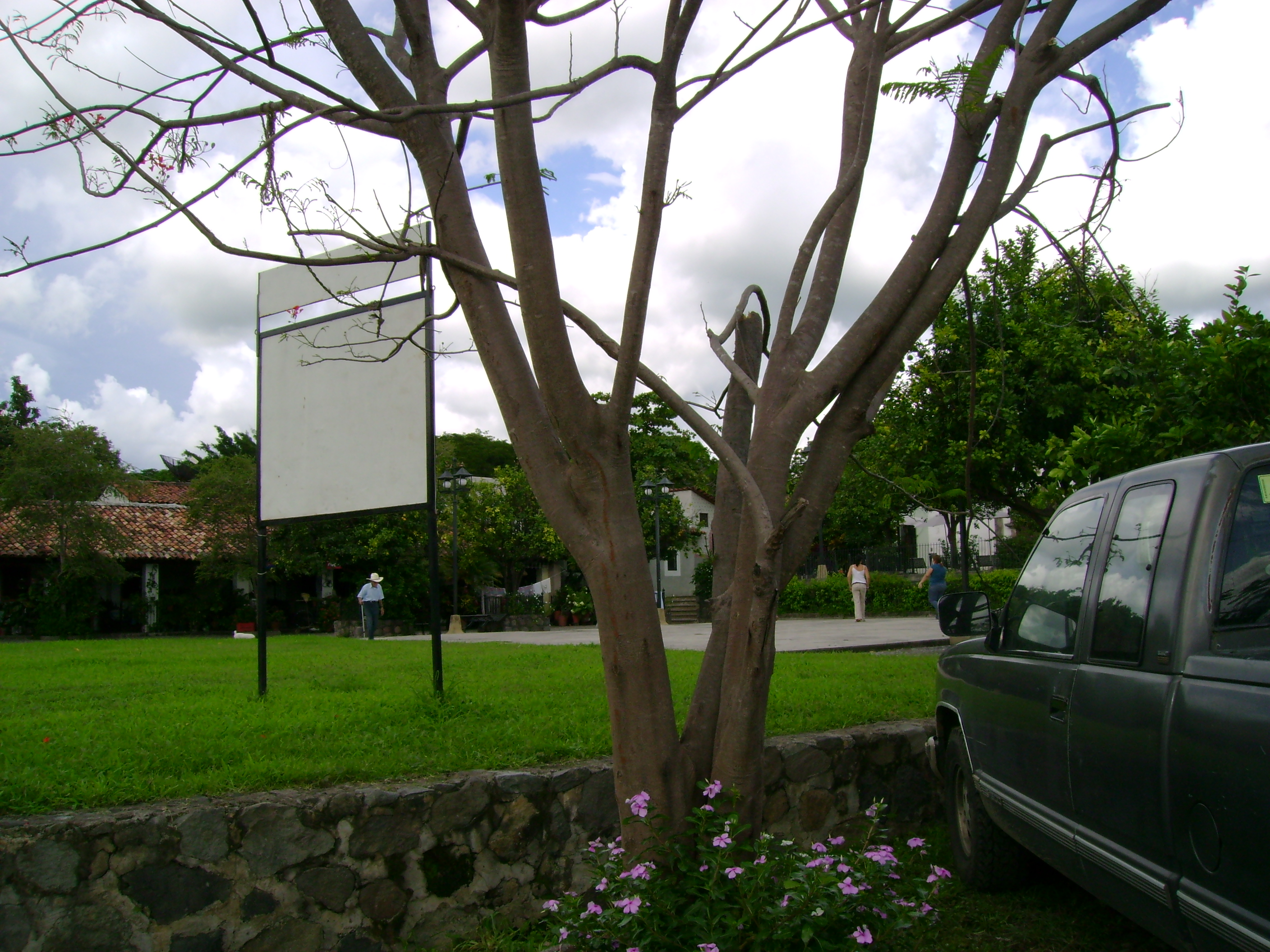 Fotografía del pueblo de Nogueras en el municipio de Comala, en Colima, México.